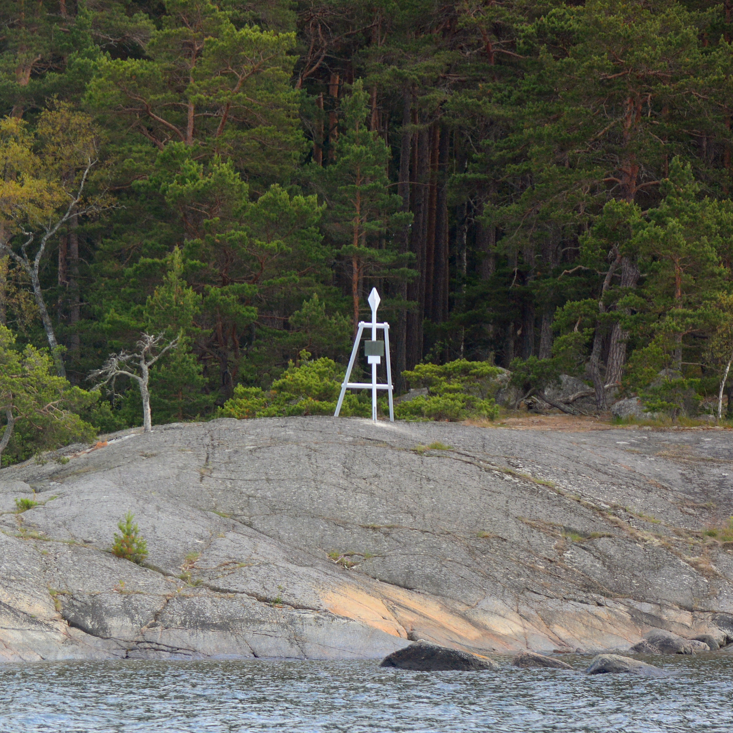 Stångmärket på Stora Kalholmen söder om Finnhamn har stått modell för Skärgårdsstiftelsens logotyp.